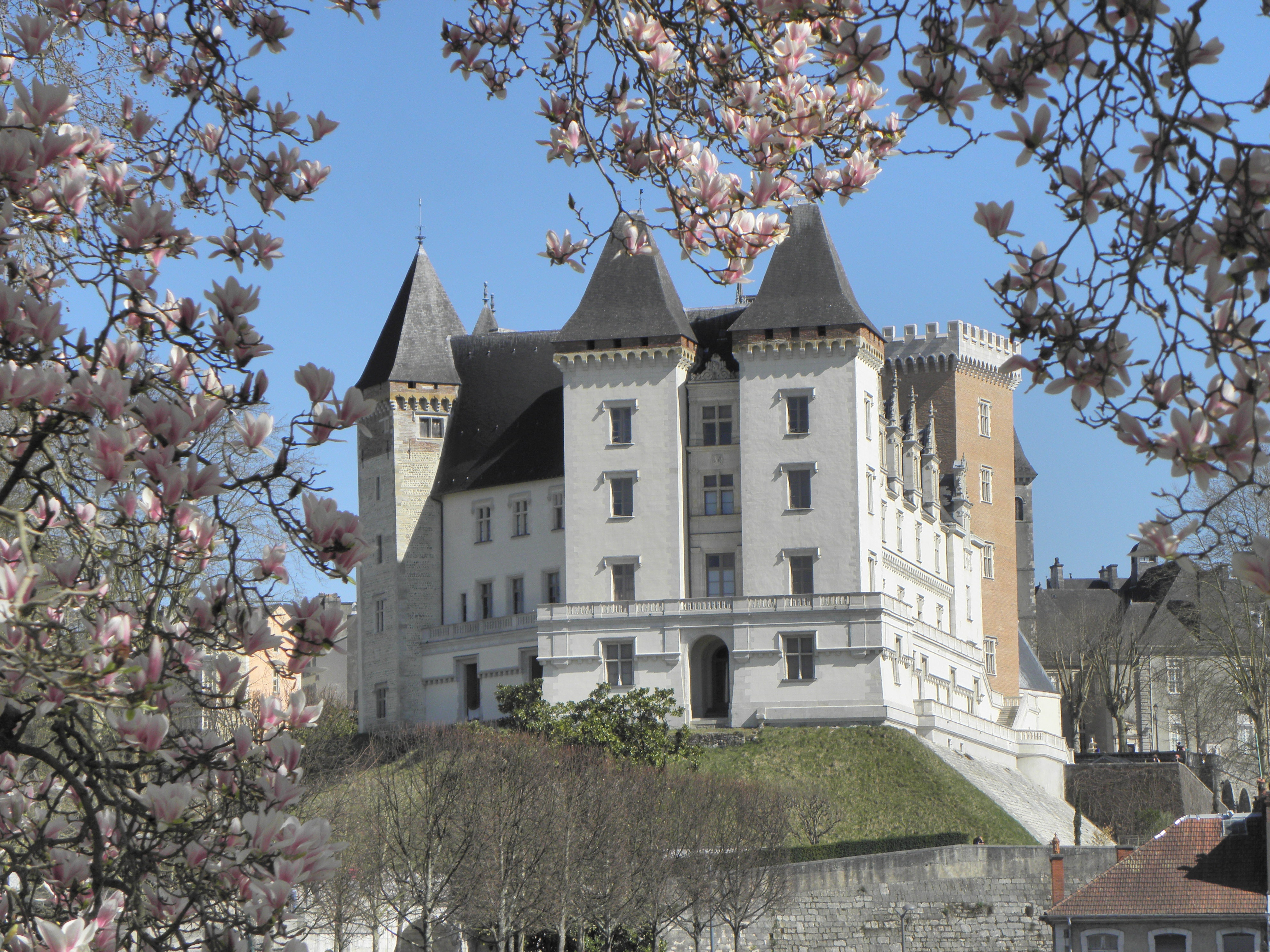 Château de Pau (ClasséClassé) .